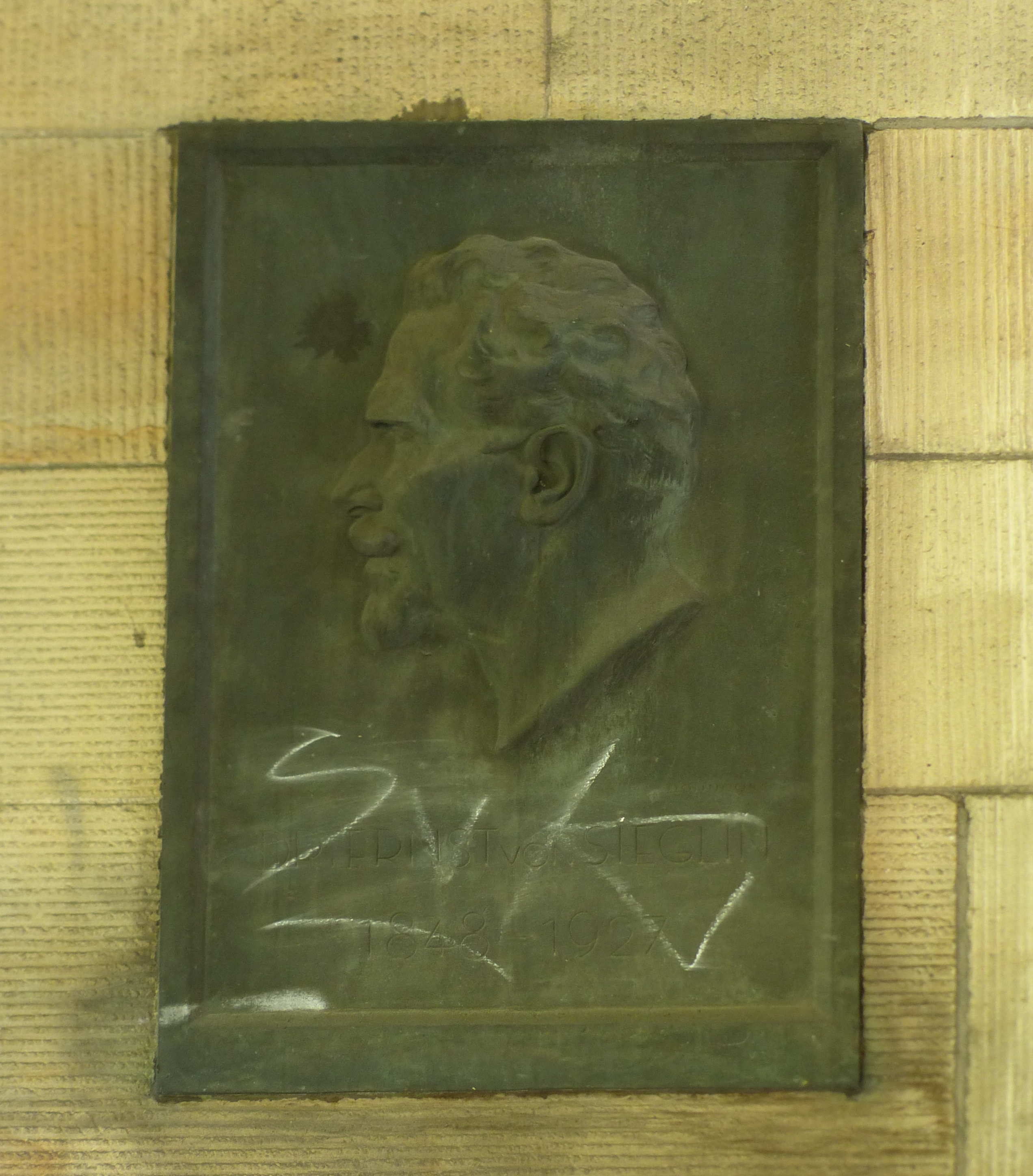 Ernst von Sieglin-Denkmal, Ernst-Sieglin-Platz, Stadtteil: Bopser, Stadtbezirk: Süd, Stadt: Stuttgart, Land: Deutschland